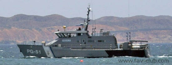 Patrullero PG 51